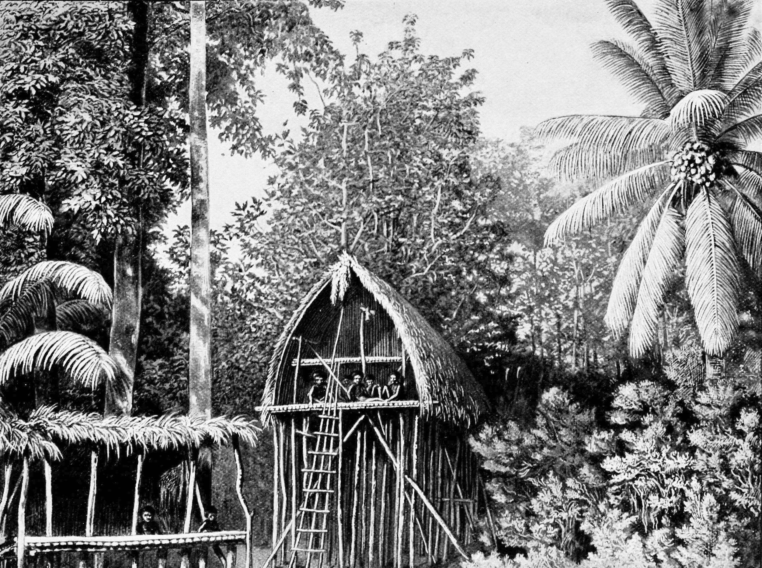 A Marea in Pinupaka